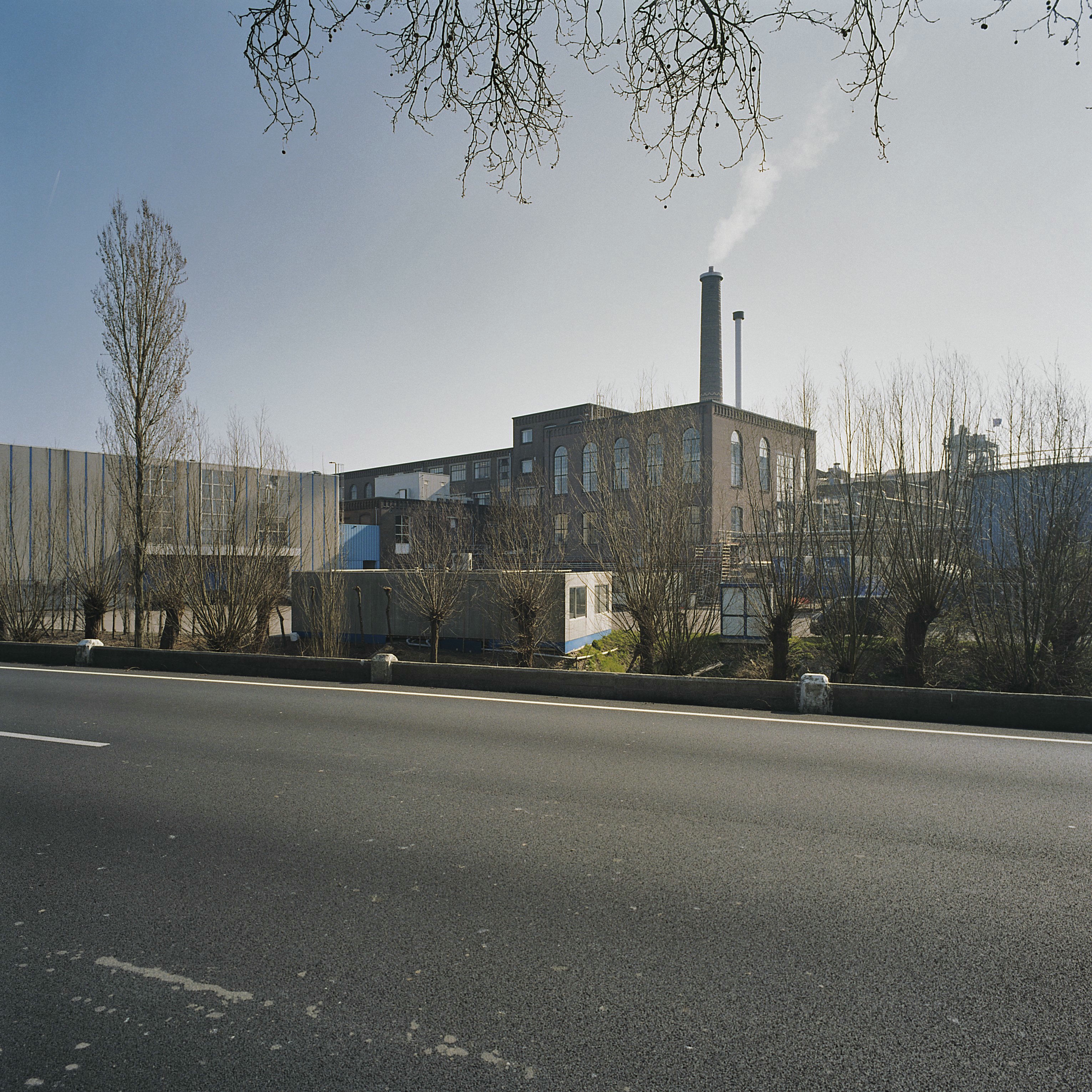 Suikerfabriek Hollandia: Overzicht (opmerking: Gefotografeerd voor Monumenten In Nederland Zuid-Holland)